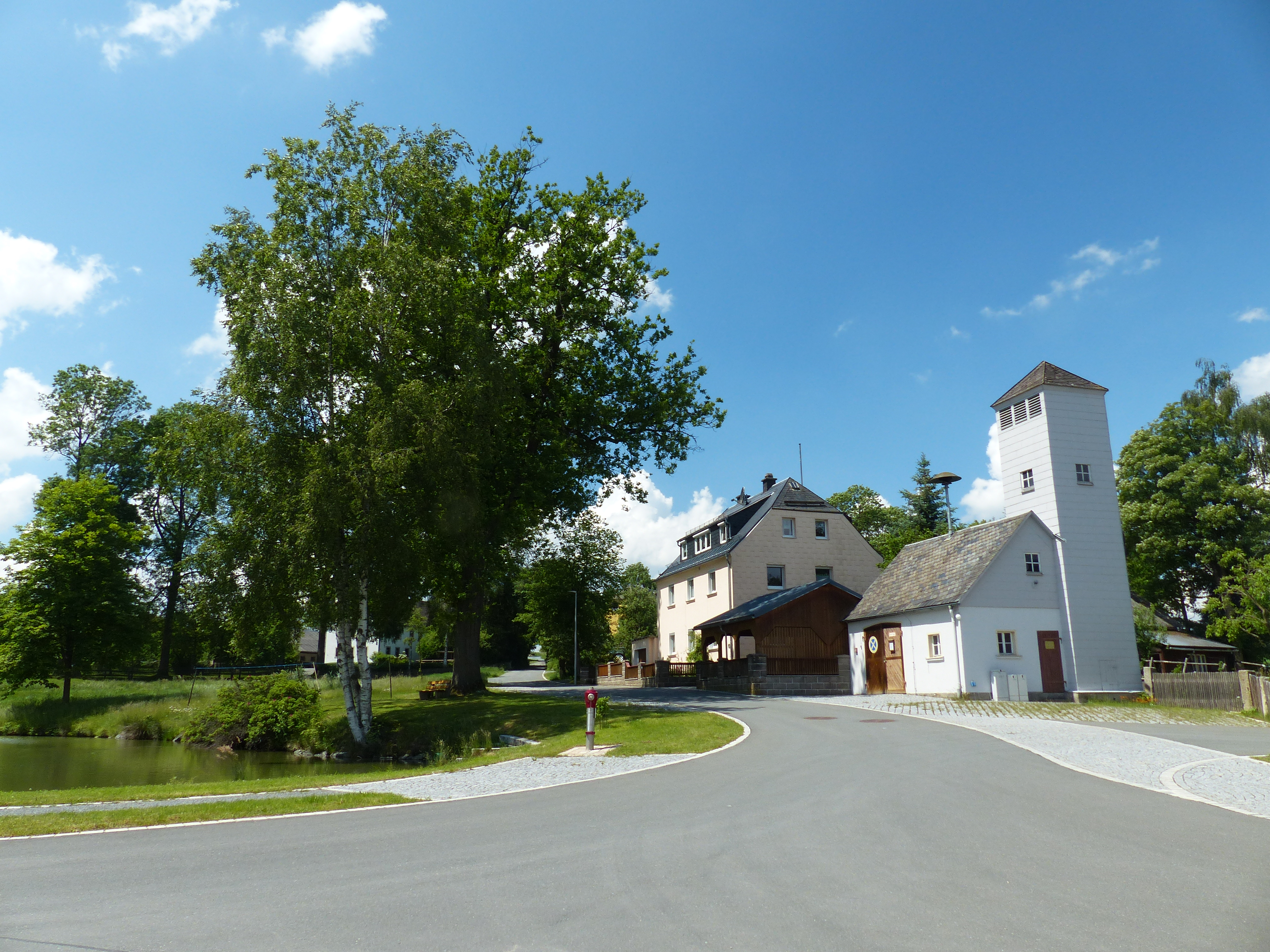 Ortansichten vom Ortsteil Laubersreuth